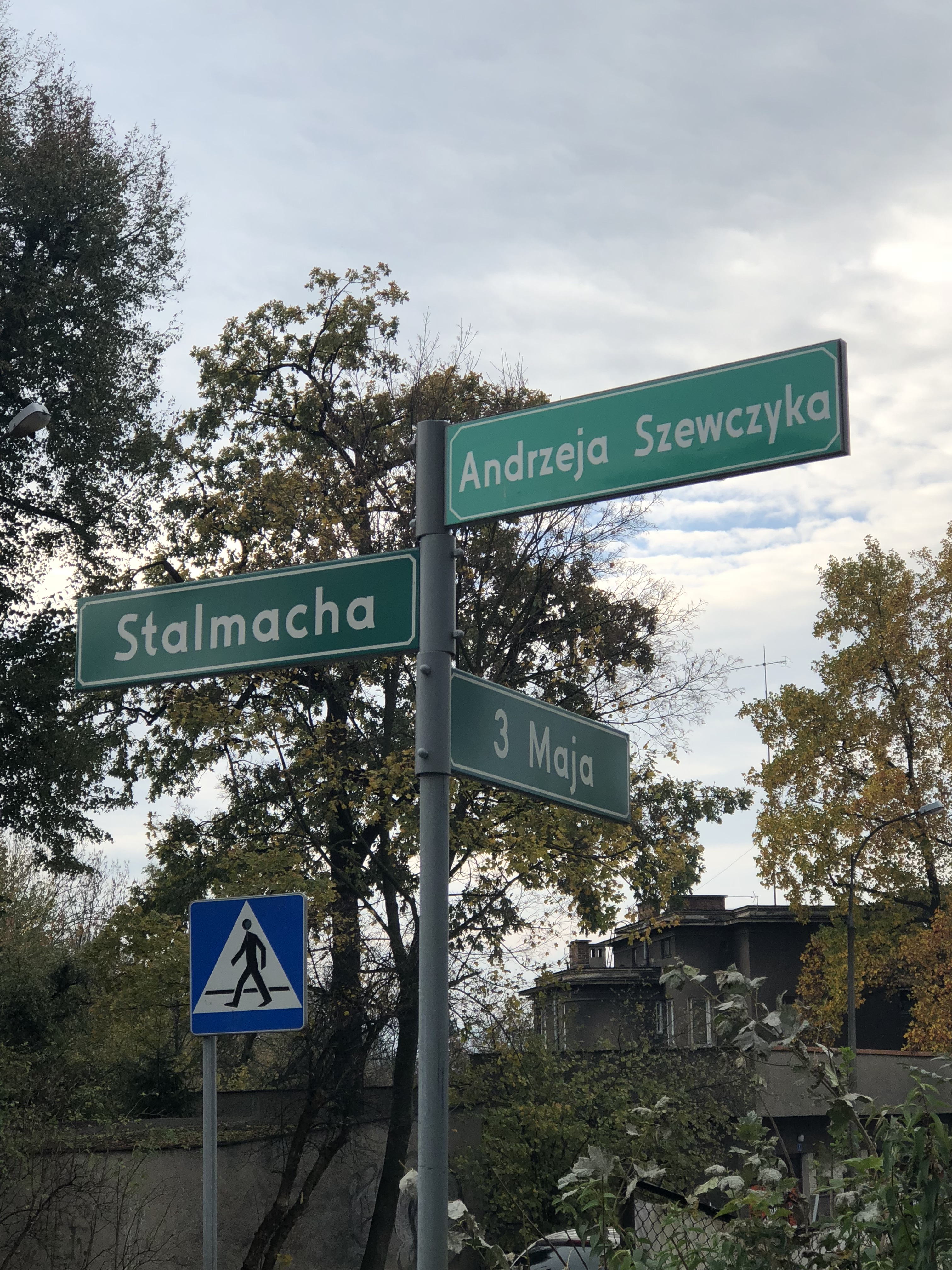 Ulica Andrzeja Szewczyka - znak